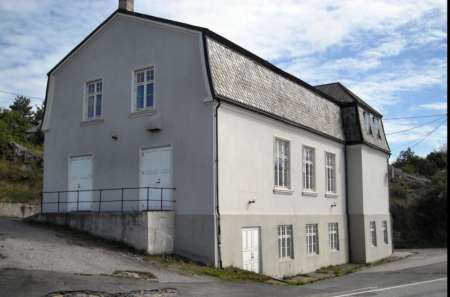 Folkets hus på Eydehavn, Arendal, Aust-Agder, Norge